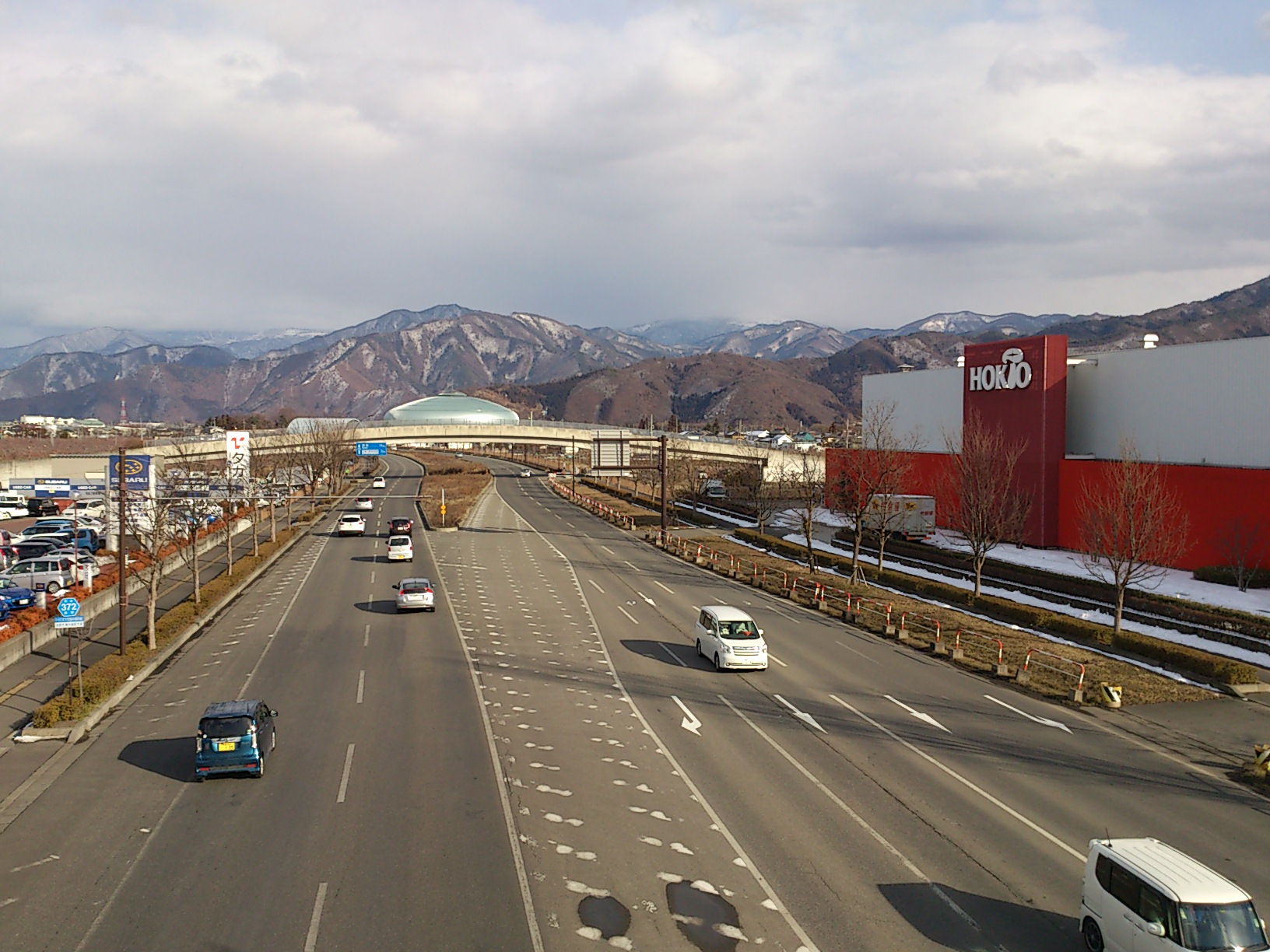 長野県道372号バイパス（長野県長野市青木島町大塚）